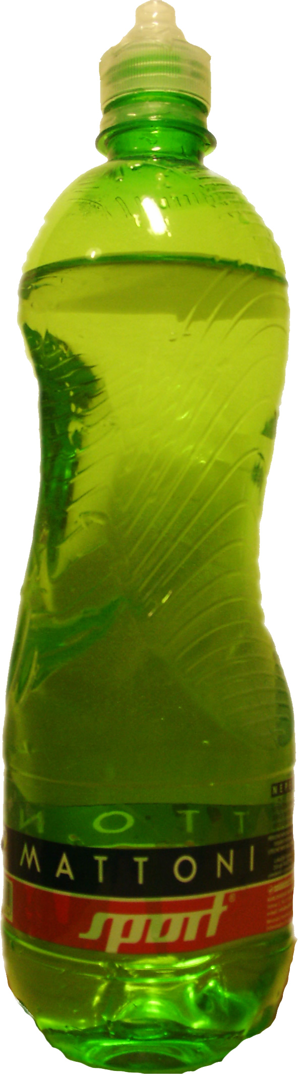 Minerální voda Mattoni sport - neperlivá (zelená).